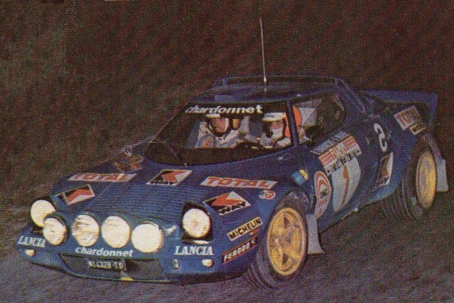 Bernard Darniche sur Lancia Stratos en 1976 (Monte Carlo) - - Panini Super Auto 77' n°40.